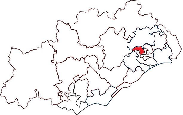 Situation du canton dans le département de l'Hérault